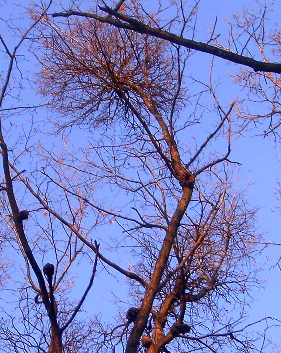 Česky: duby v PP Baba napadené ochmetem